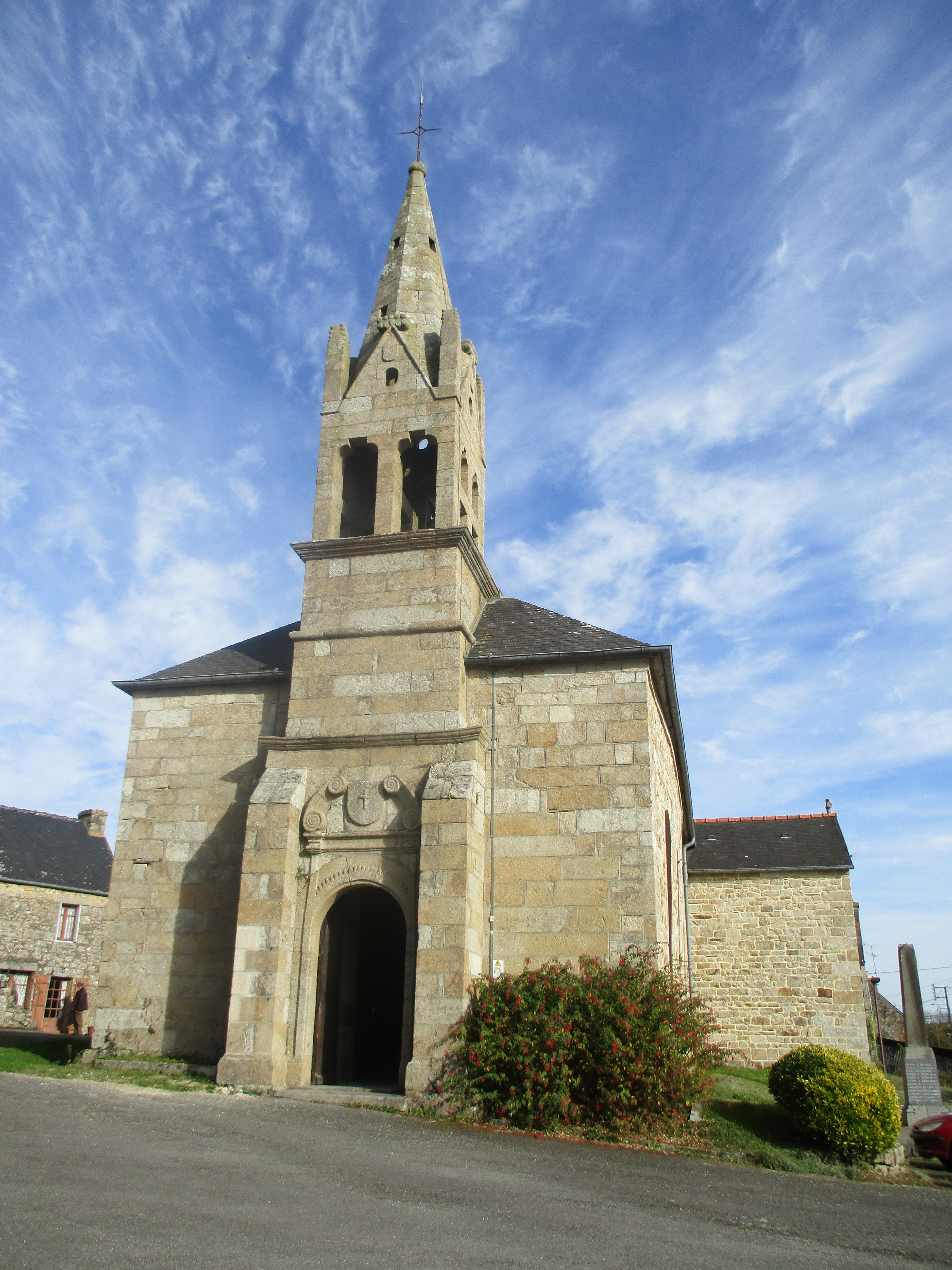 L'église Saint-Gwenaël de Lescouët-Gouarec